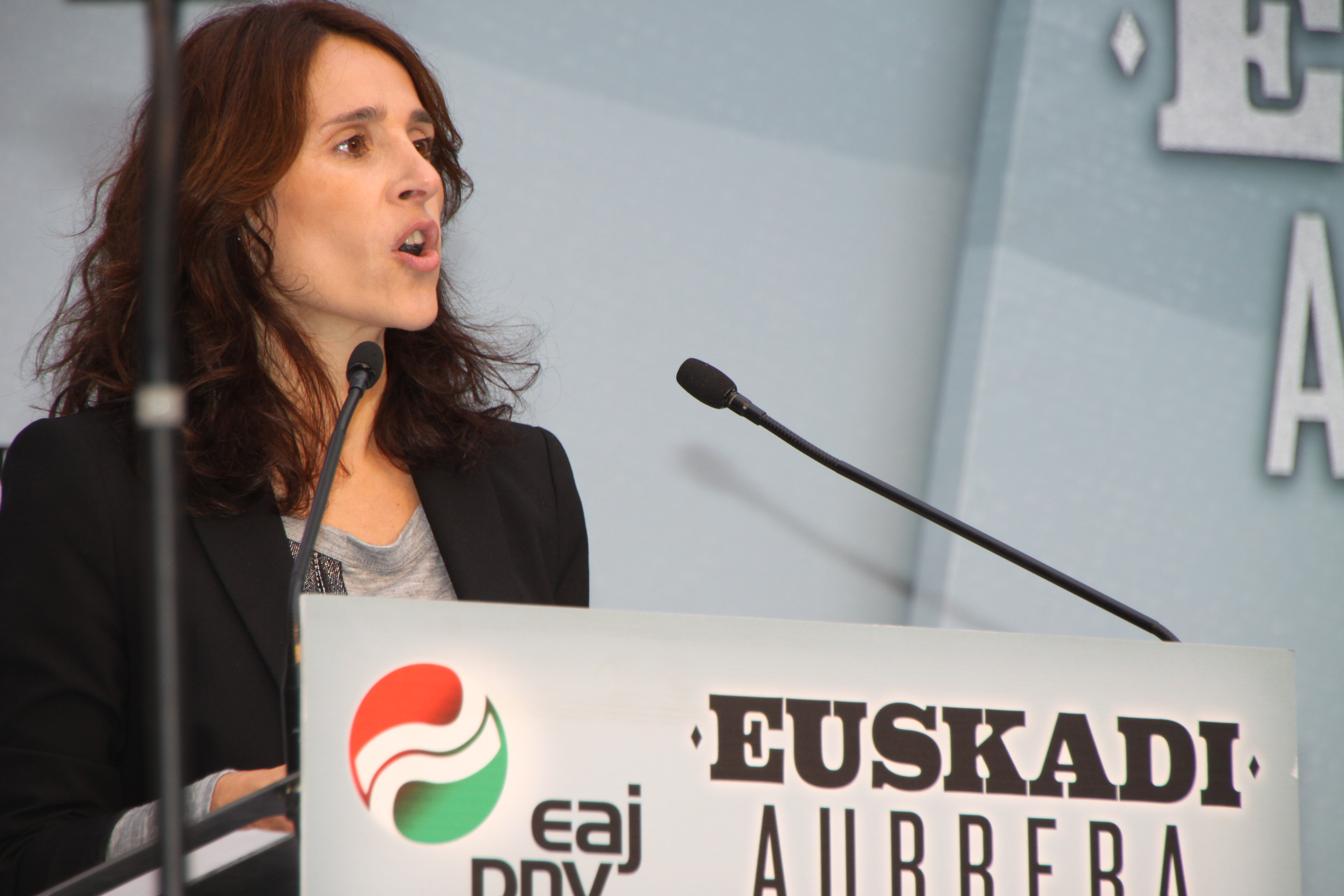 2012ko urriaren 12an, Iñigo Urkullu EAJren lehendakarigaiak, Andoni Ortuzar BBBko lehendakariak eta Bakartxo Telleria Eusko Legebiltzarreko presidentegaiak hauteskunde mitina eman zuten Areetako Eskoletako edo Ipotxen plazan, ehunaka zaleen aurrean.